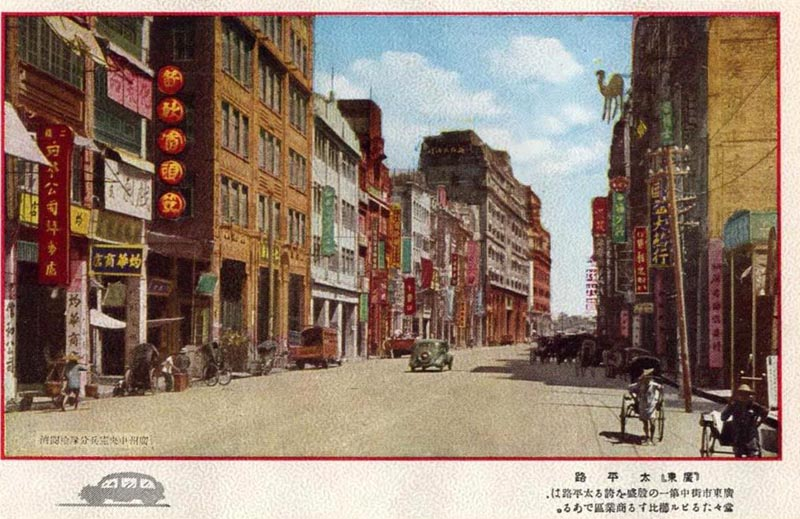 廣州市太平路。